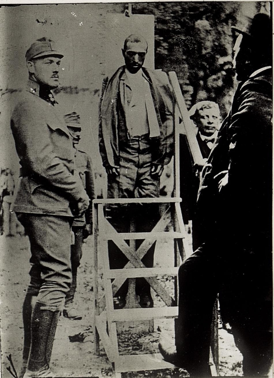 Hinrichtung Fabio Filzis am 12. Juli 1916 im Schloßgraben von Trient, am rechten Bildrand der Scharfrichter Josef Lang.